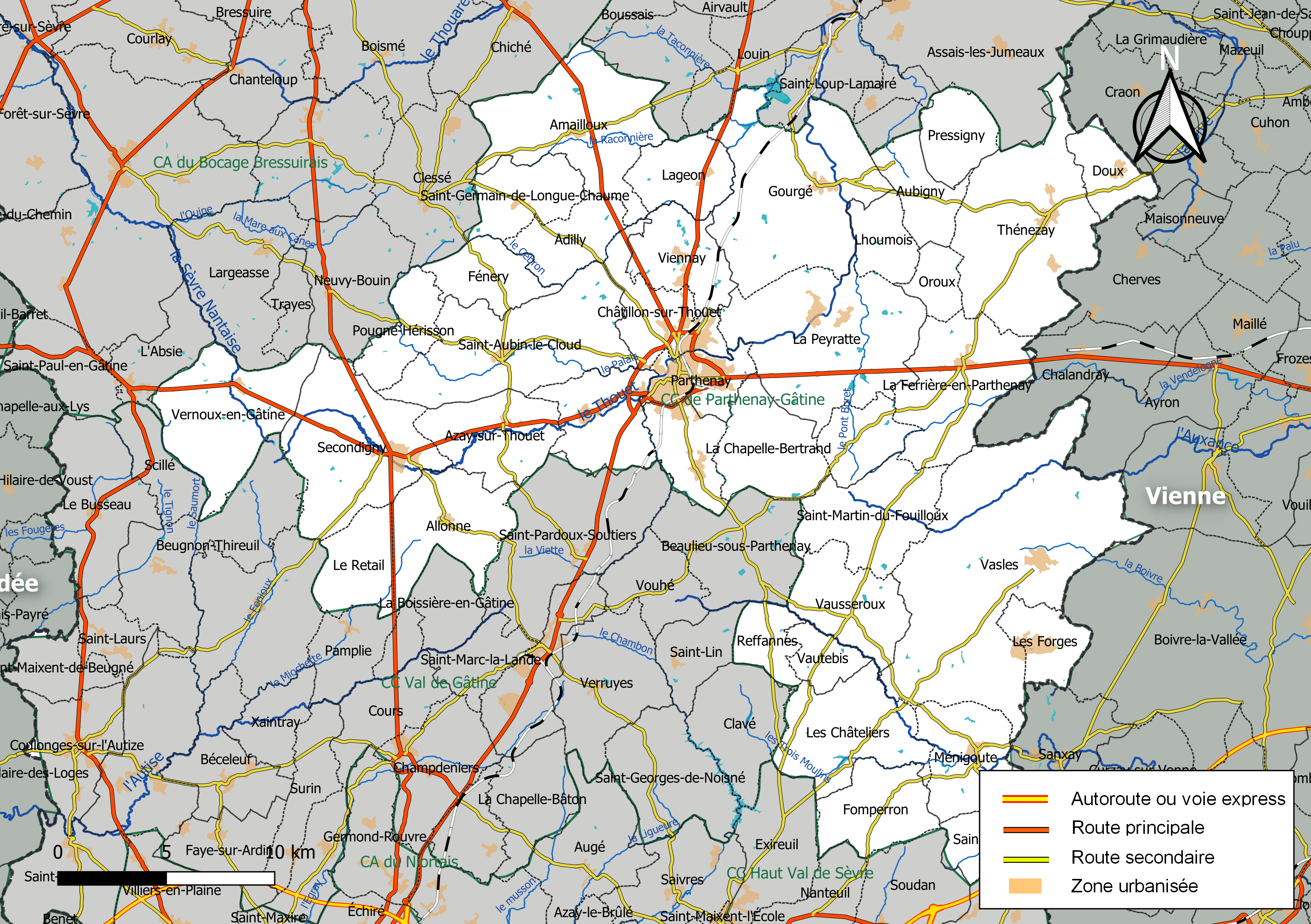 Carte géographique de la Communauté de communes de Parthenay-Gâtine, département des Deux-Sèvres, France. Composition au 1er janvier 2019.